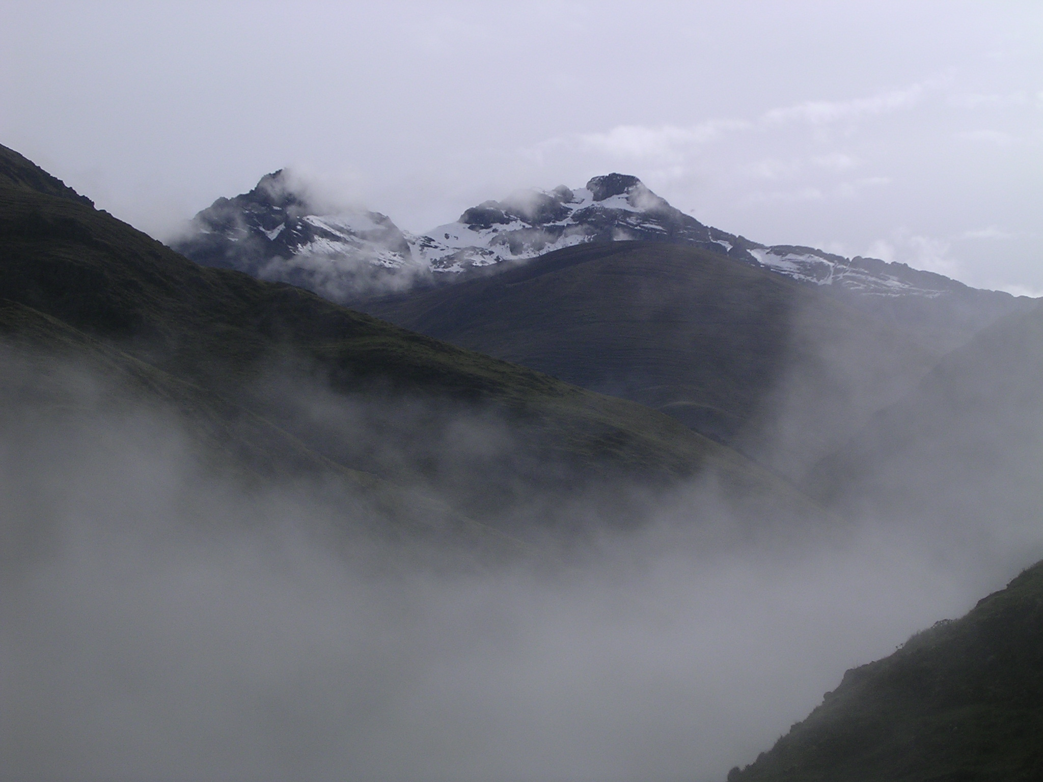 Coñocranra es el pico más alto de la Cordillera Negra, Perú, 5181 msnm.